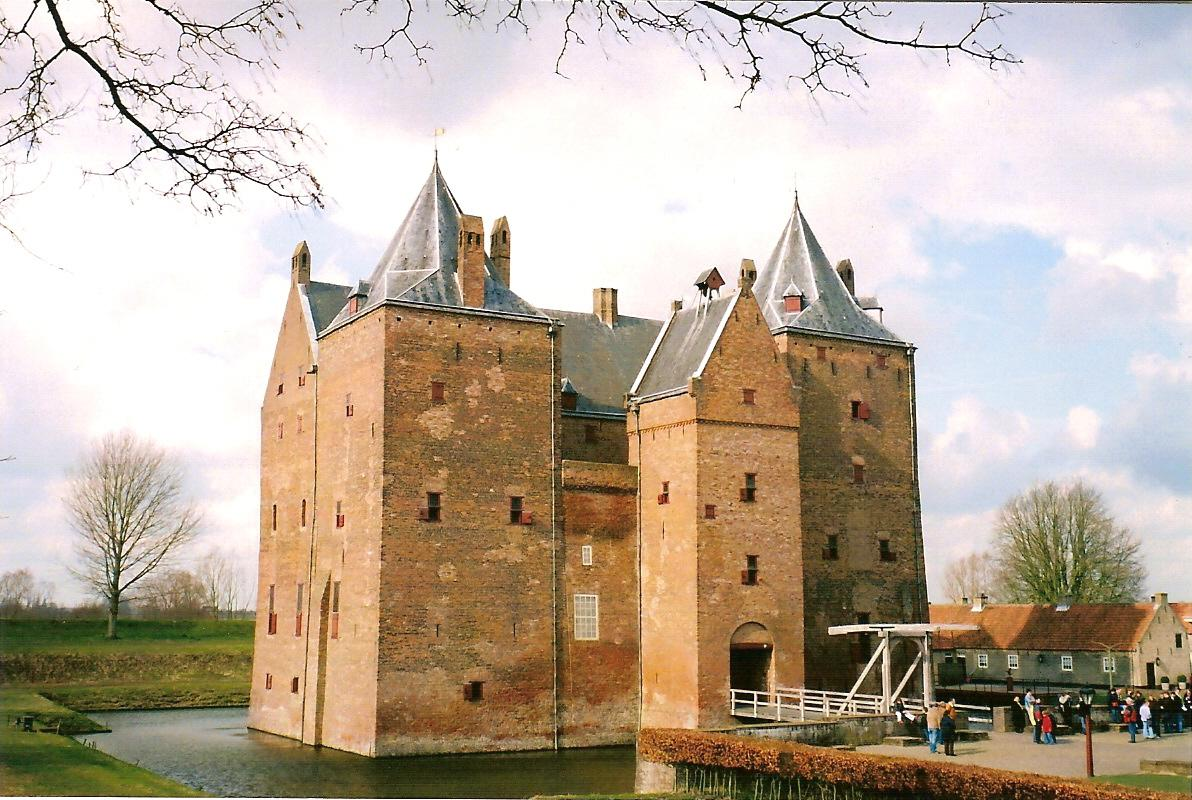 Castle Loevestein, Netherlands